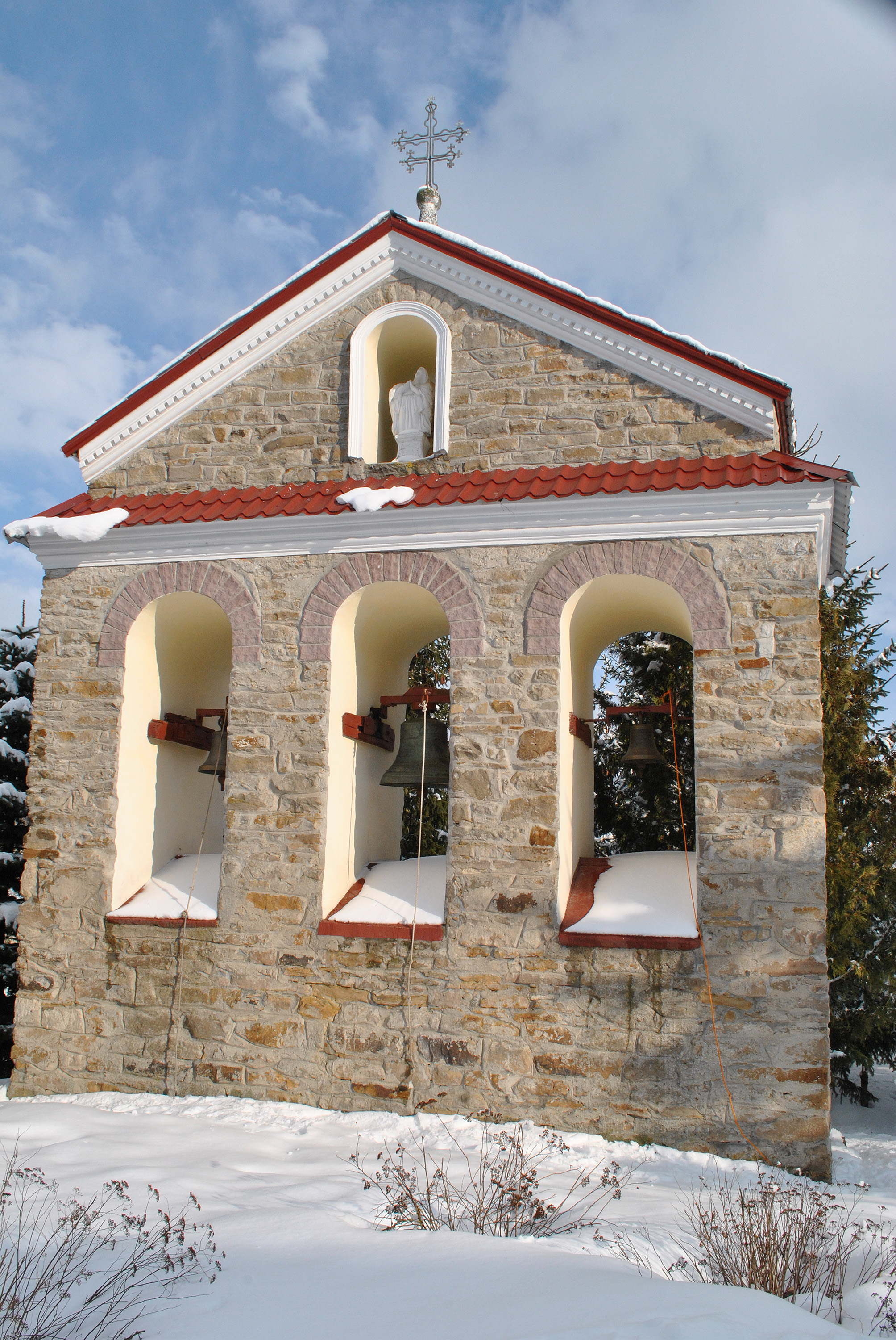 Дзвіниця церкви Непорочного Зачаття Пречистої Діви Марії (в реєстрі пам’яток — Церква Св. Петра і Павла) Великоберезовицького деканату Тернопільсько-Зборівської архієпархії УГКЦ в селі Буцневі Тернопільського району Тернопільської области (Україна).